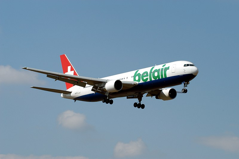 Boeing 767 der Belair